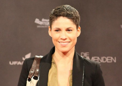 Jasmin Gerat am 27.10.2010 auf der Premiere zu „Die kommenden Tage“ im Berliner Sony Center